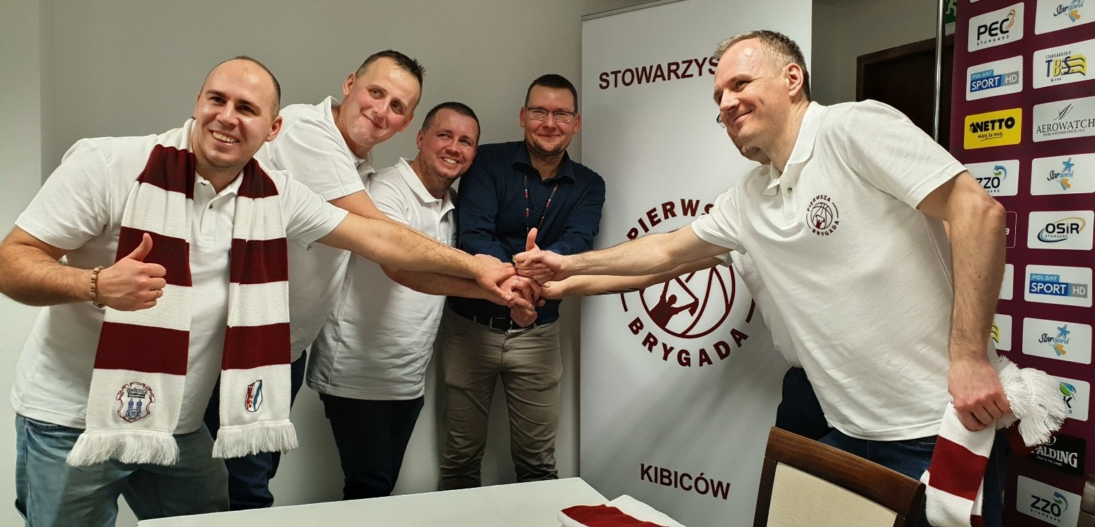 Stowarzyszenie Pierwsza Brygada